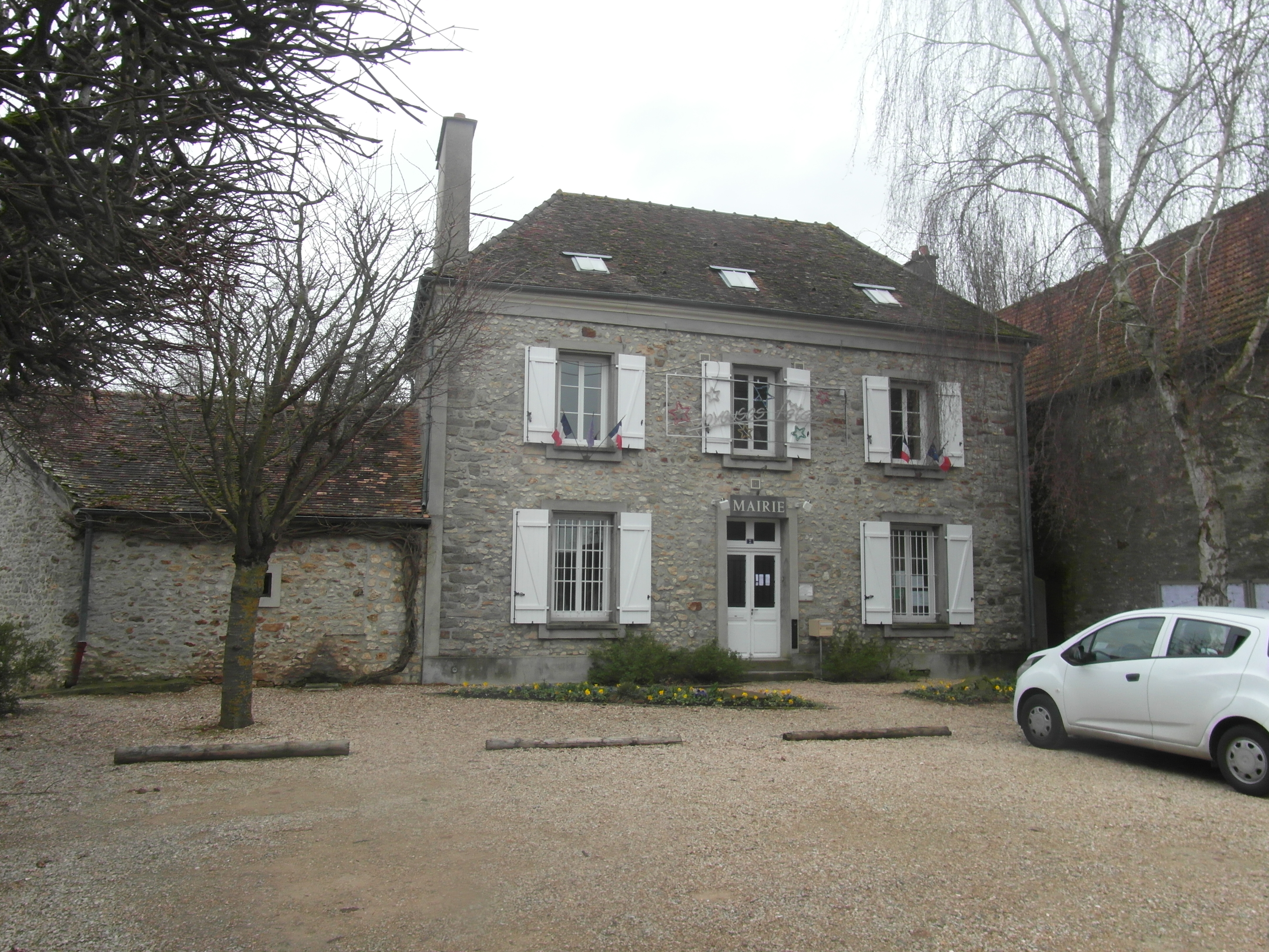 Mairie de Réau (Seine-et-Marne)